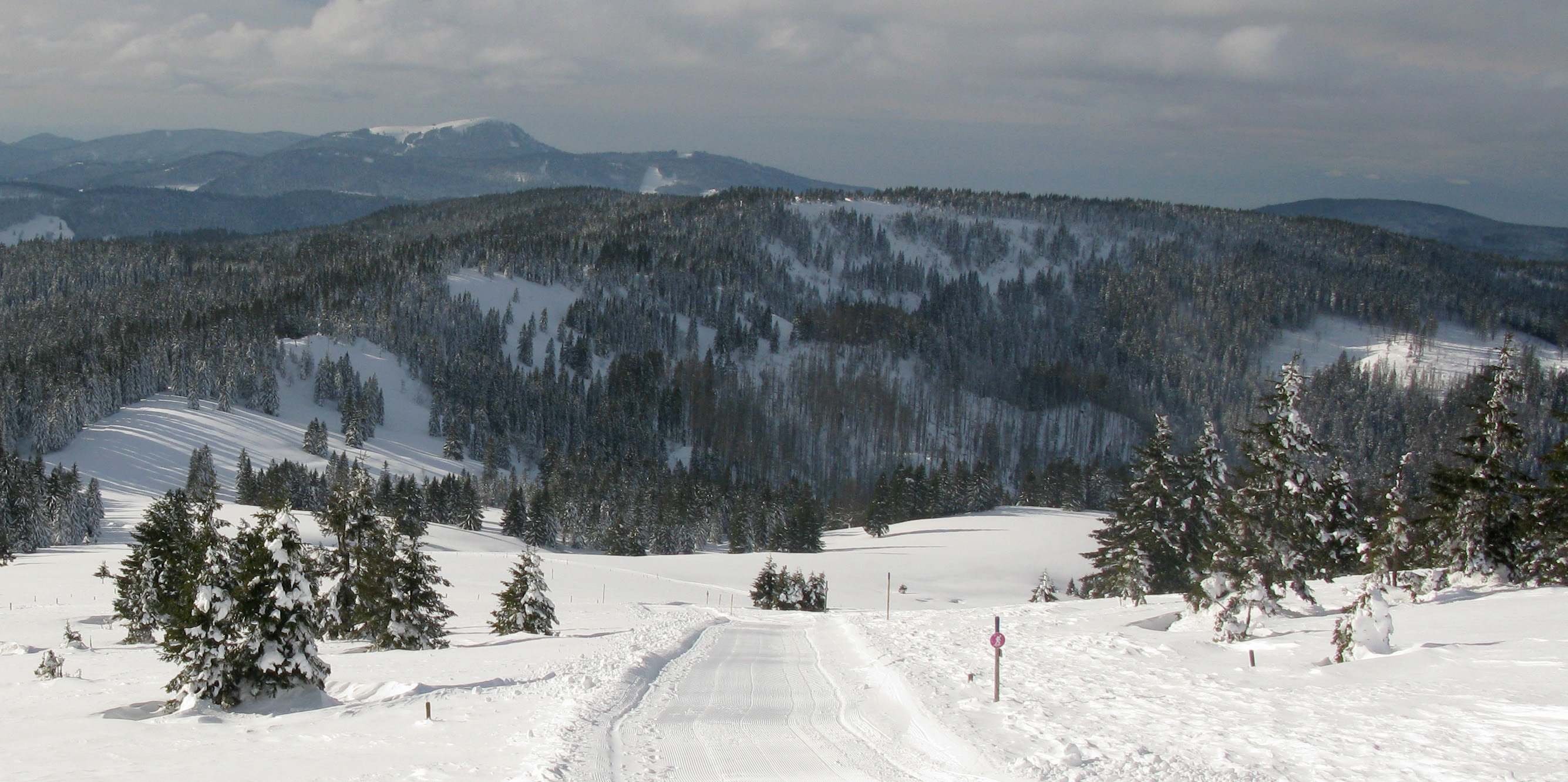 Stübenwasen vom Feldberg mit Belchen im Hintergrund